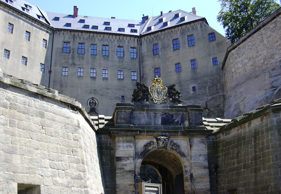 Festung Königstein